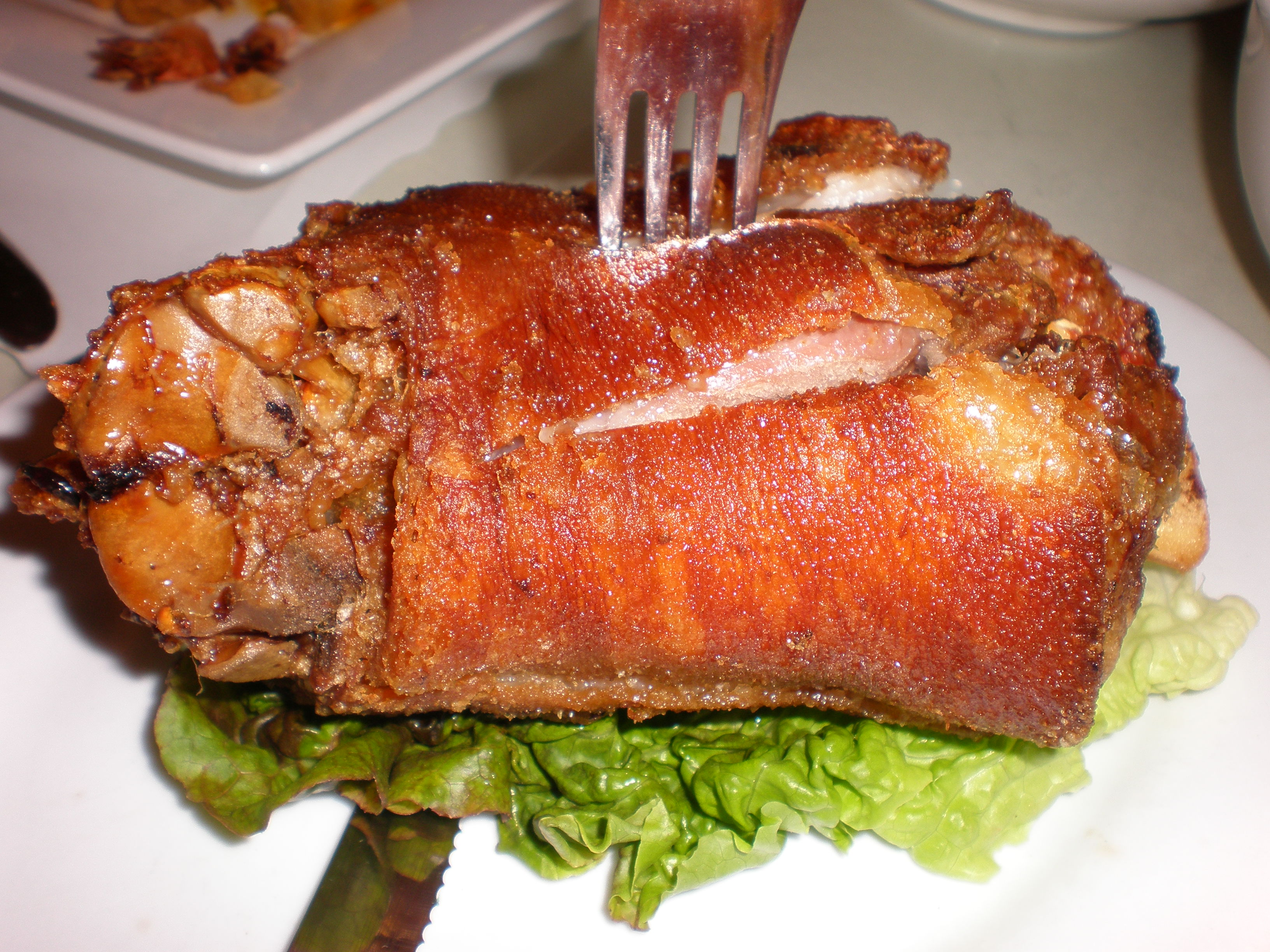 Crispy pata from Patio Filipino in San Bruno, California.